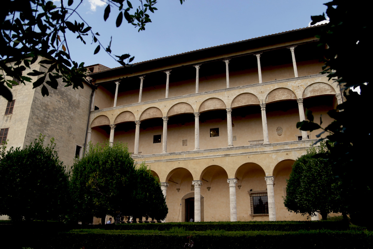 Palazzo Piccolomini, Pienza, Italia.